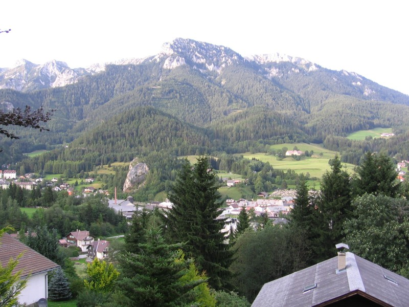 Neuberg an der Mürz / Österreich